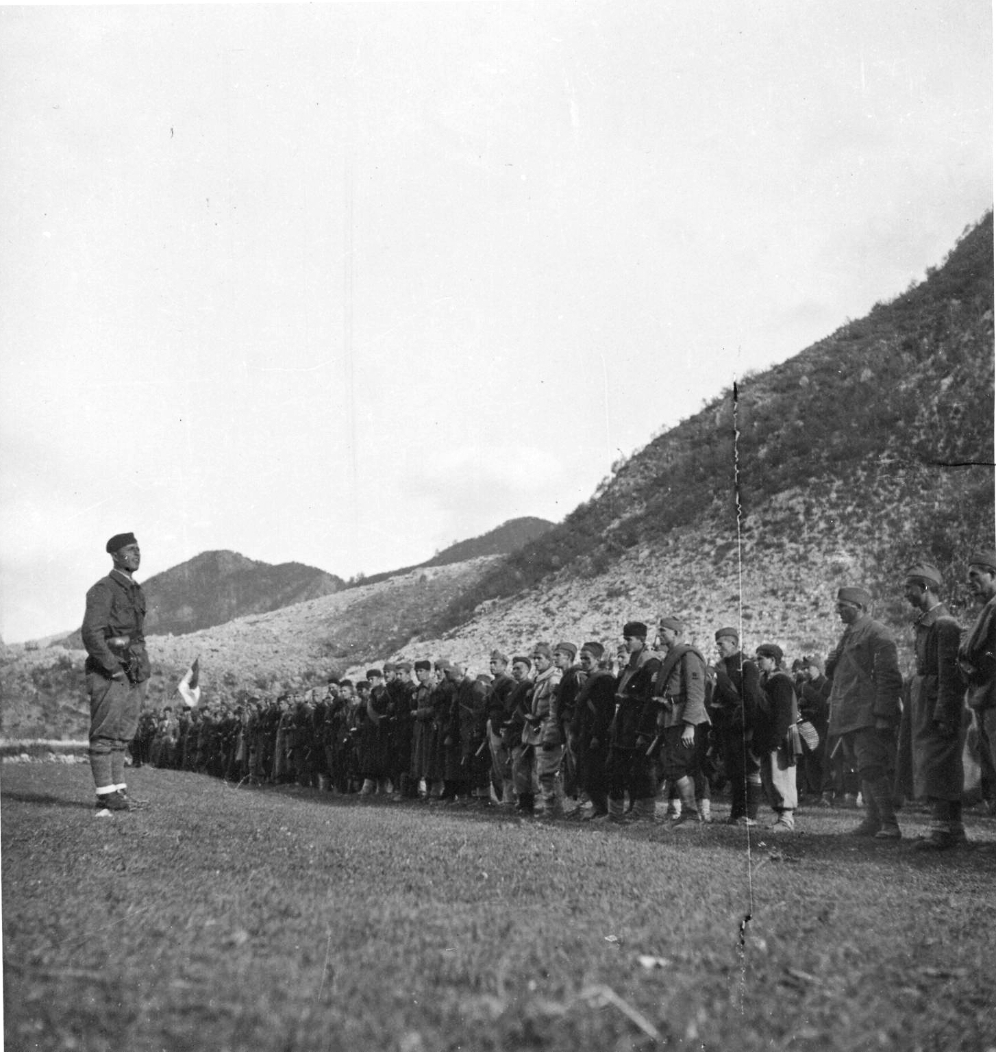 Mitar Bakic parla ai partigiani della Seconda divisione proletaria alla vigilia della battaglia della Sutjeska